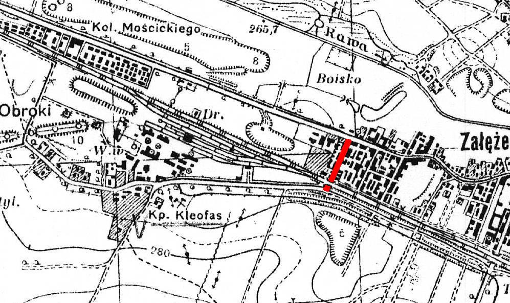 Mapa ulicy Wiśniowej w Katowicach - Załężu (mapa pochodzi z roku 1933 Z archiwów Wojskowego Instytutu Geograficznego w Warszawie).